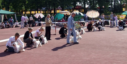 Międzynarodowa Wystawa Psów Rasowych, Wrocław 2006.